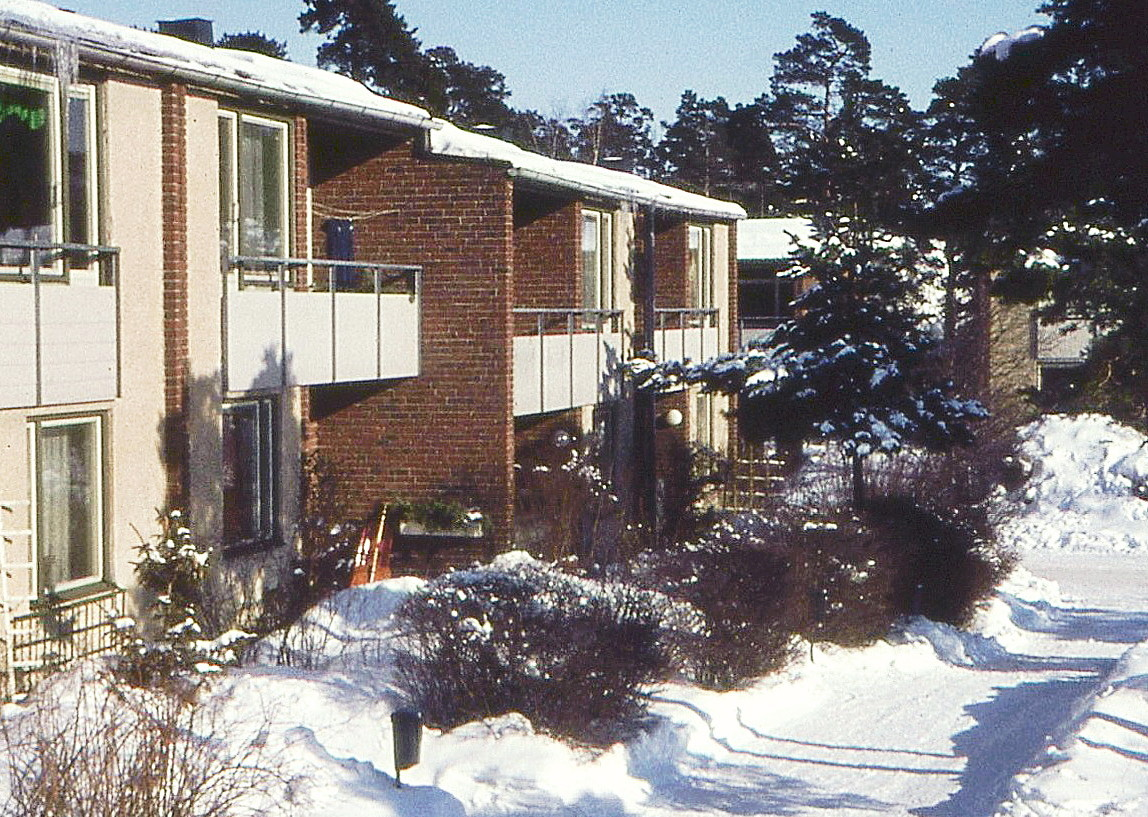 Riksrådsvägen vinter 1983